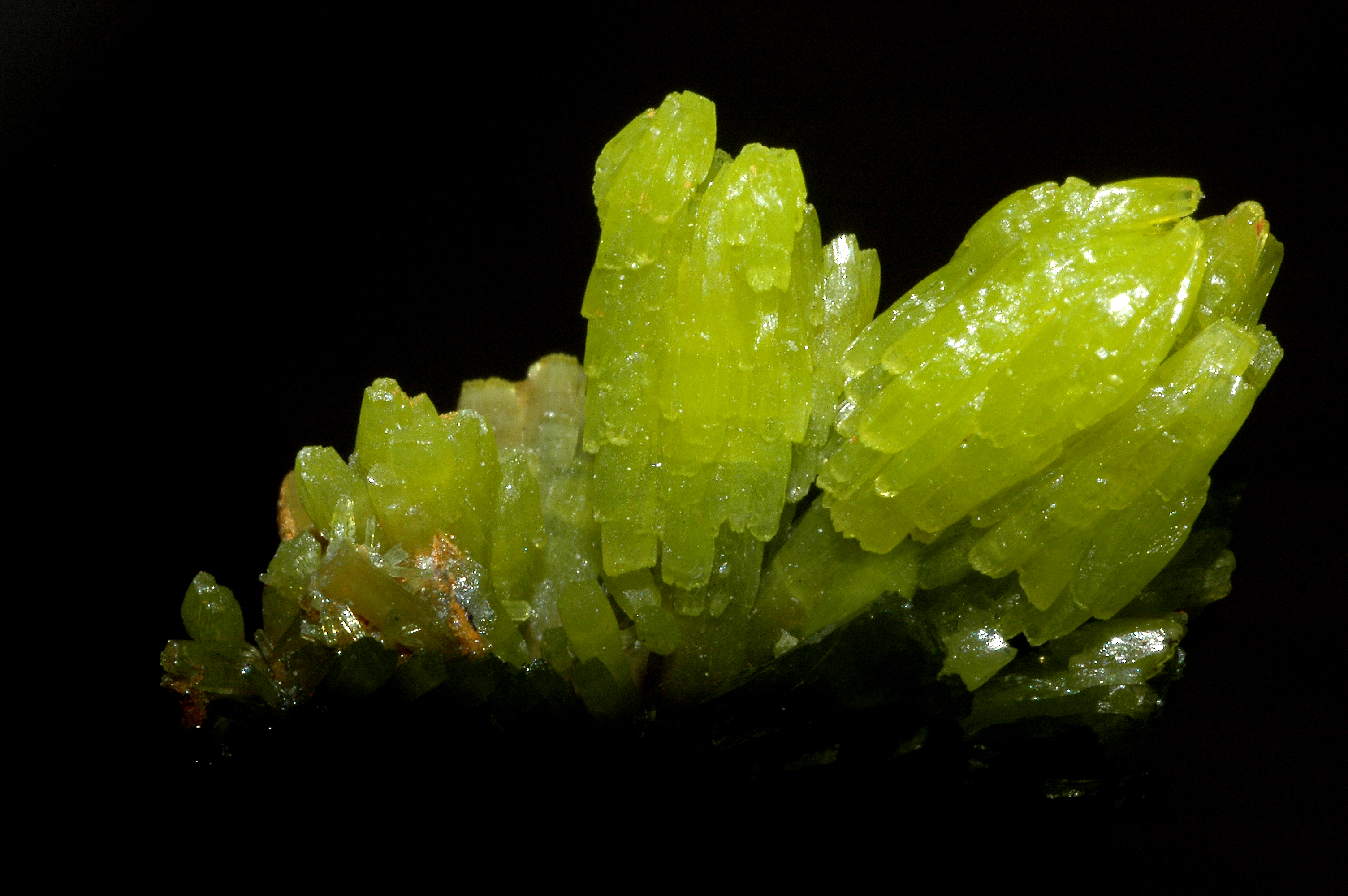 cristaux de pyromorphite